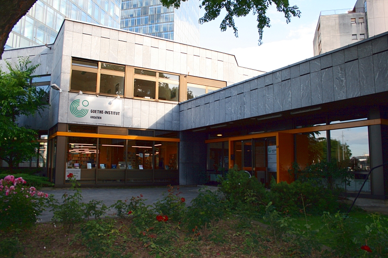 Goethe institut u Zagrebu